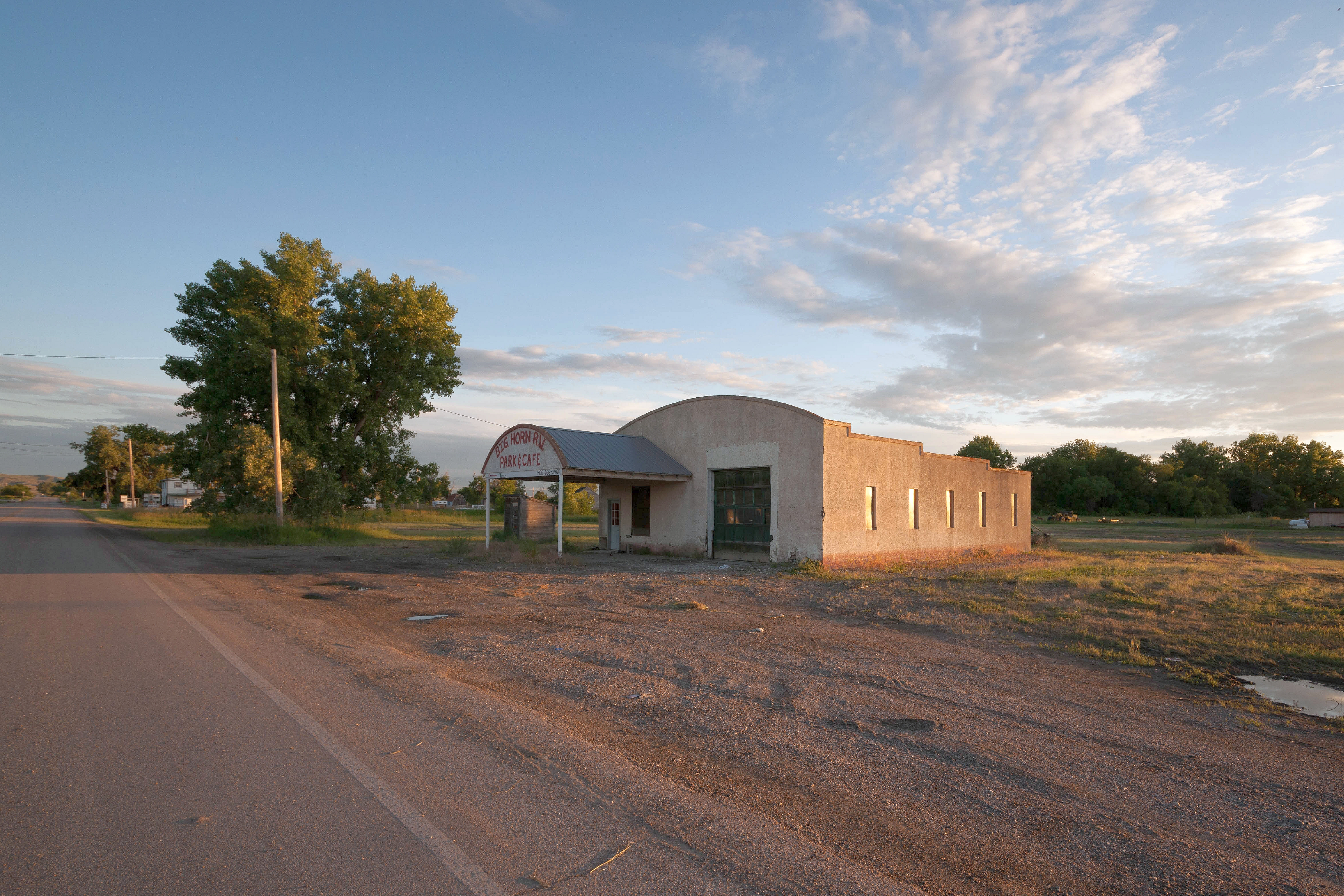 St. Xavier, Montana